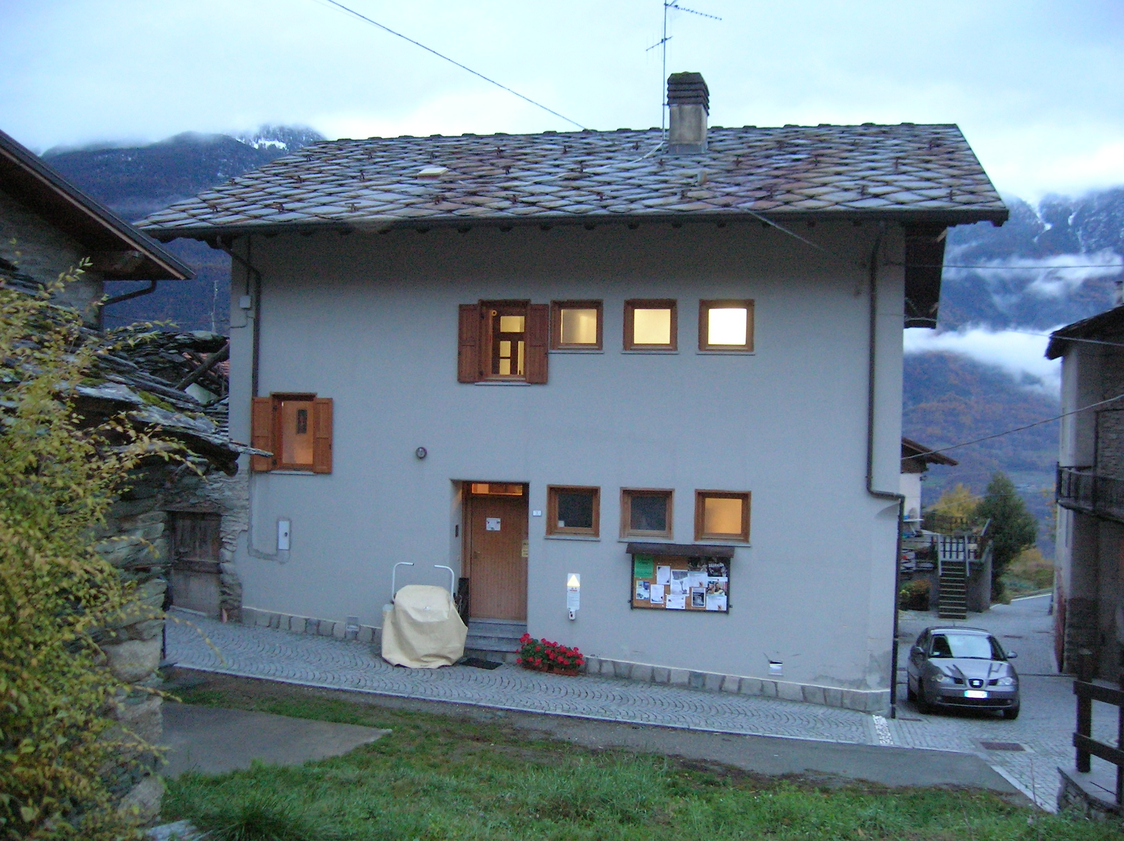 biblioteca di Saint-Denis, Valle d'Aosta, Italia.